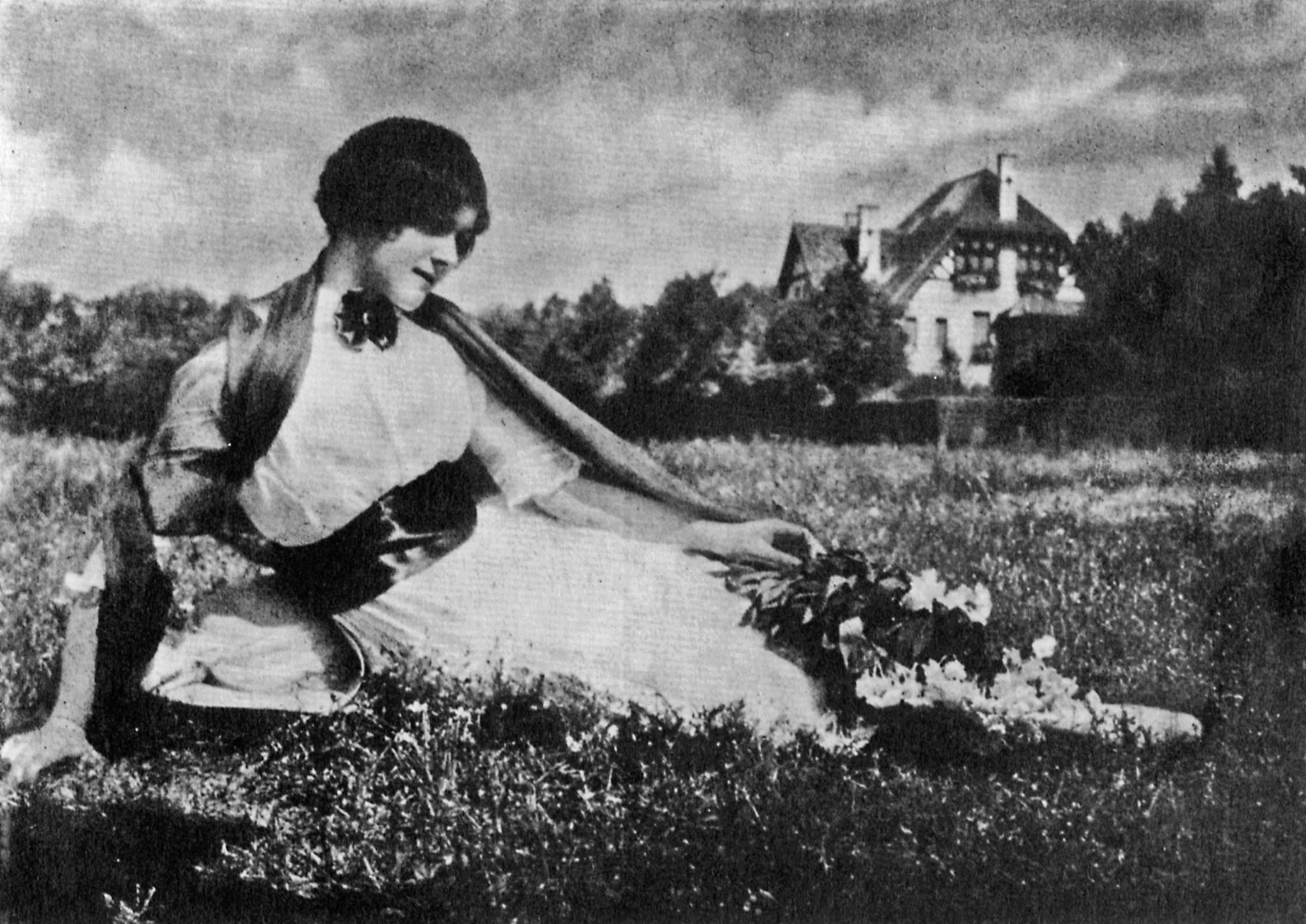 Nicola Perscheid: Junge Frau auf einer Wiese. Gummidruck, Deutschland um 1900